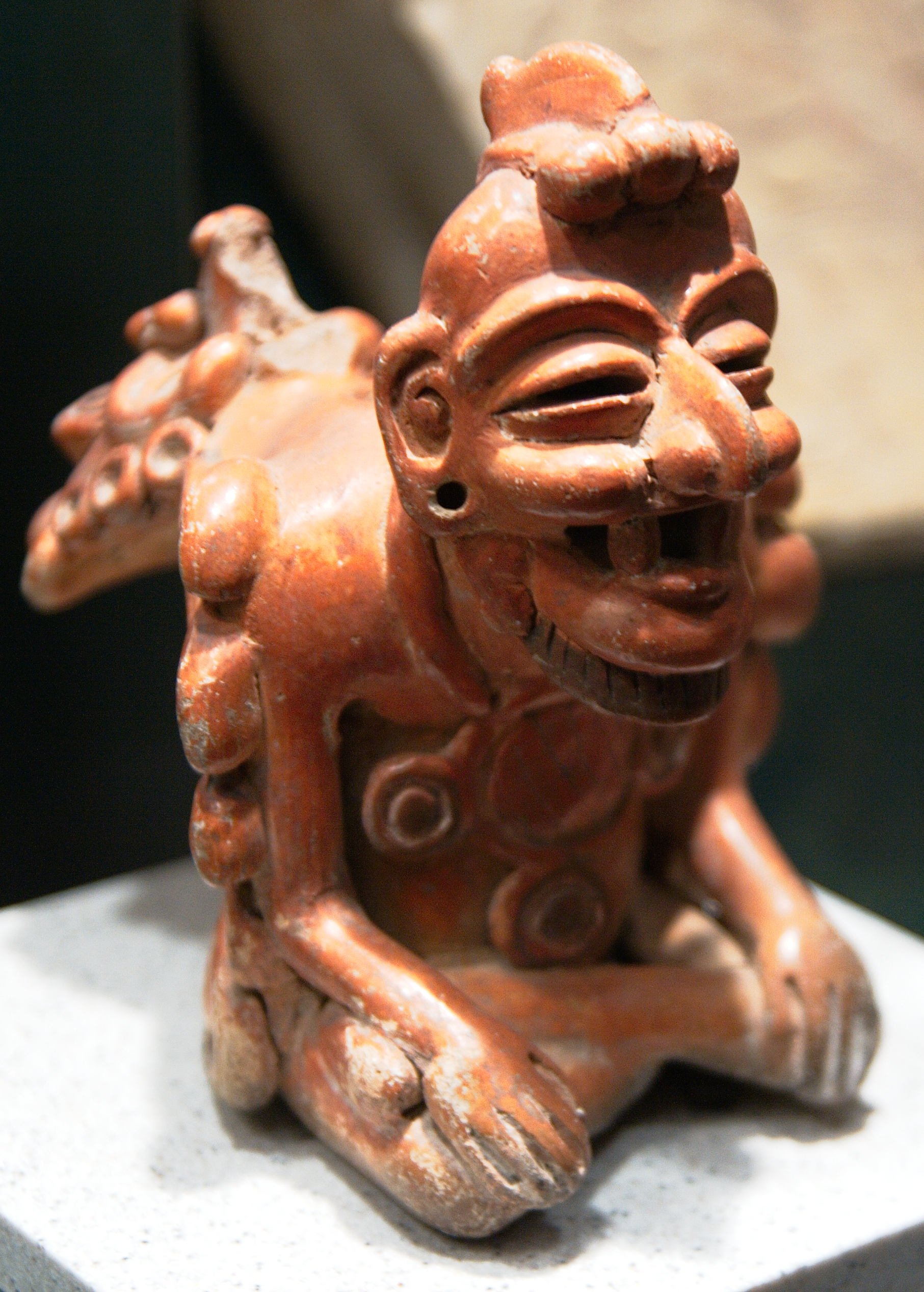 Pequeña efigie del Dios Viejo del Fuego. Colección del Museo Nacional de Antropología